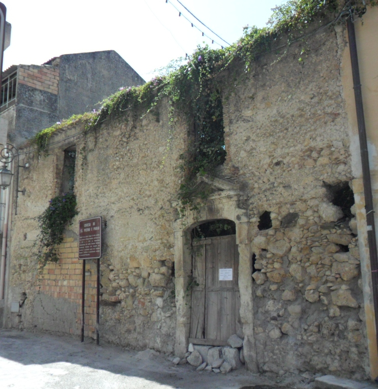 Gioiosa Jonica Chiesa dei Santi Pietro e Paolo